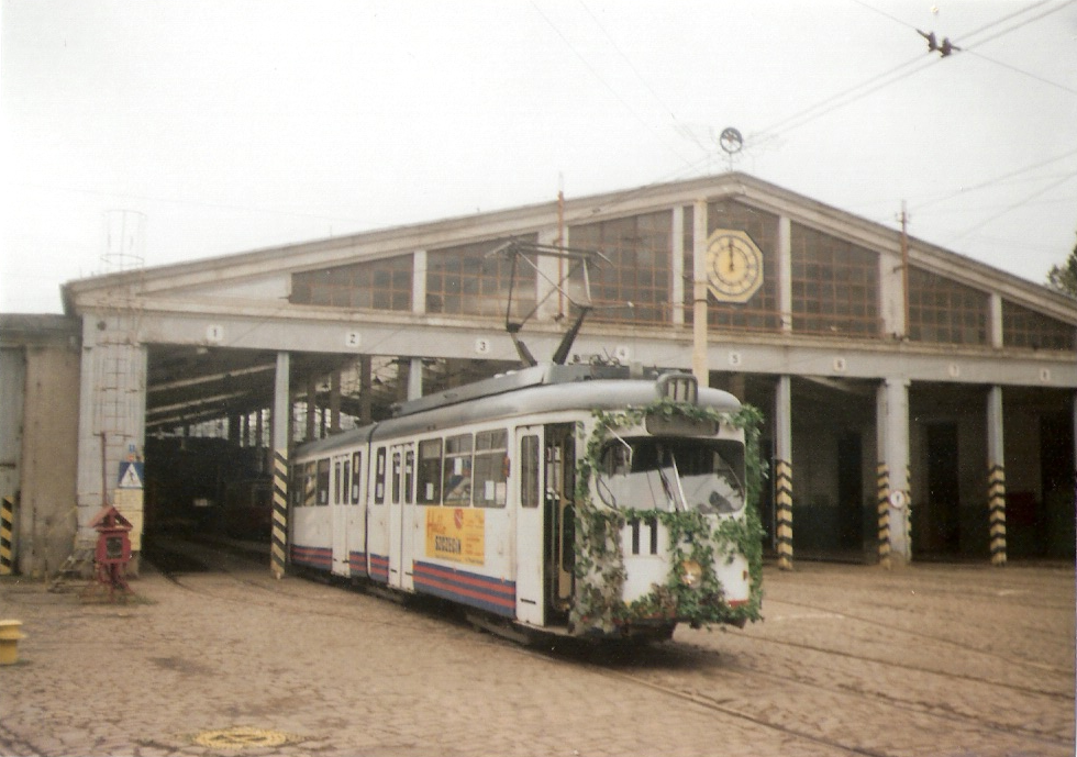 Zajezdnia Niemierzyn w Szczecinie. Wyjazd ostatniego tramwaju - 1 października 2004 r.